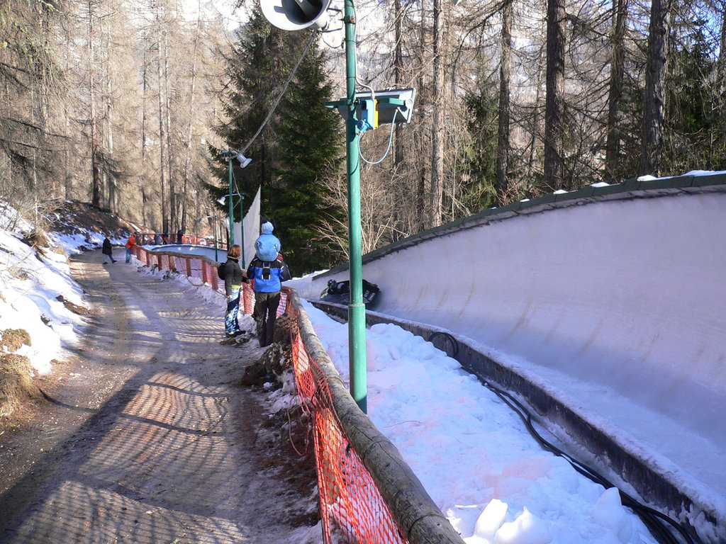 I vincitori assoluti della gara di coppa del mondo tappa Cortina d'Ampezzo, escono dai Labirinti e si lanciano verso l'ultima parte del tracciato.